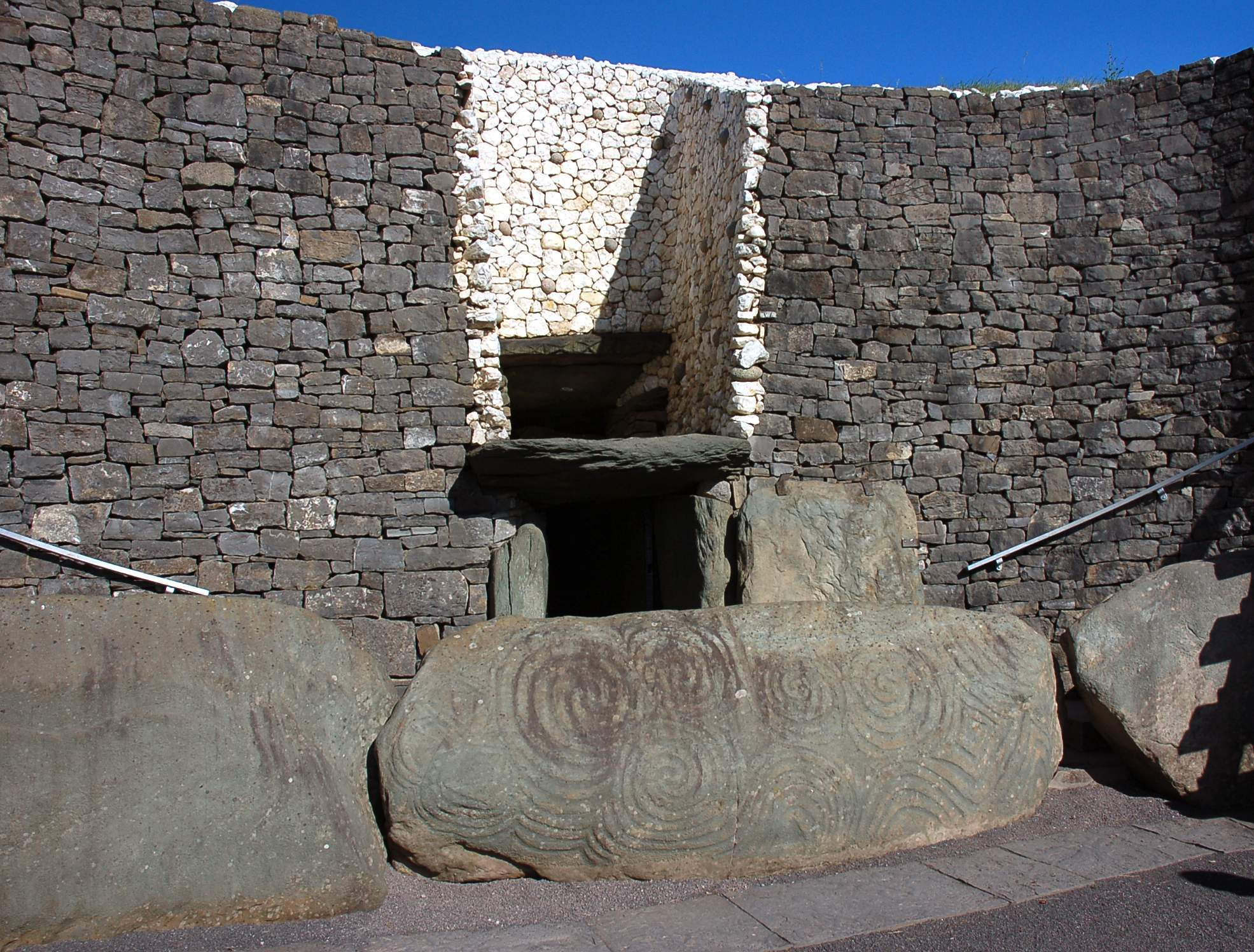 Benutzer:Matysik 24.08.2006